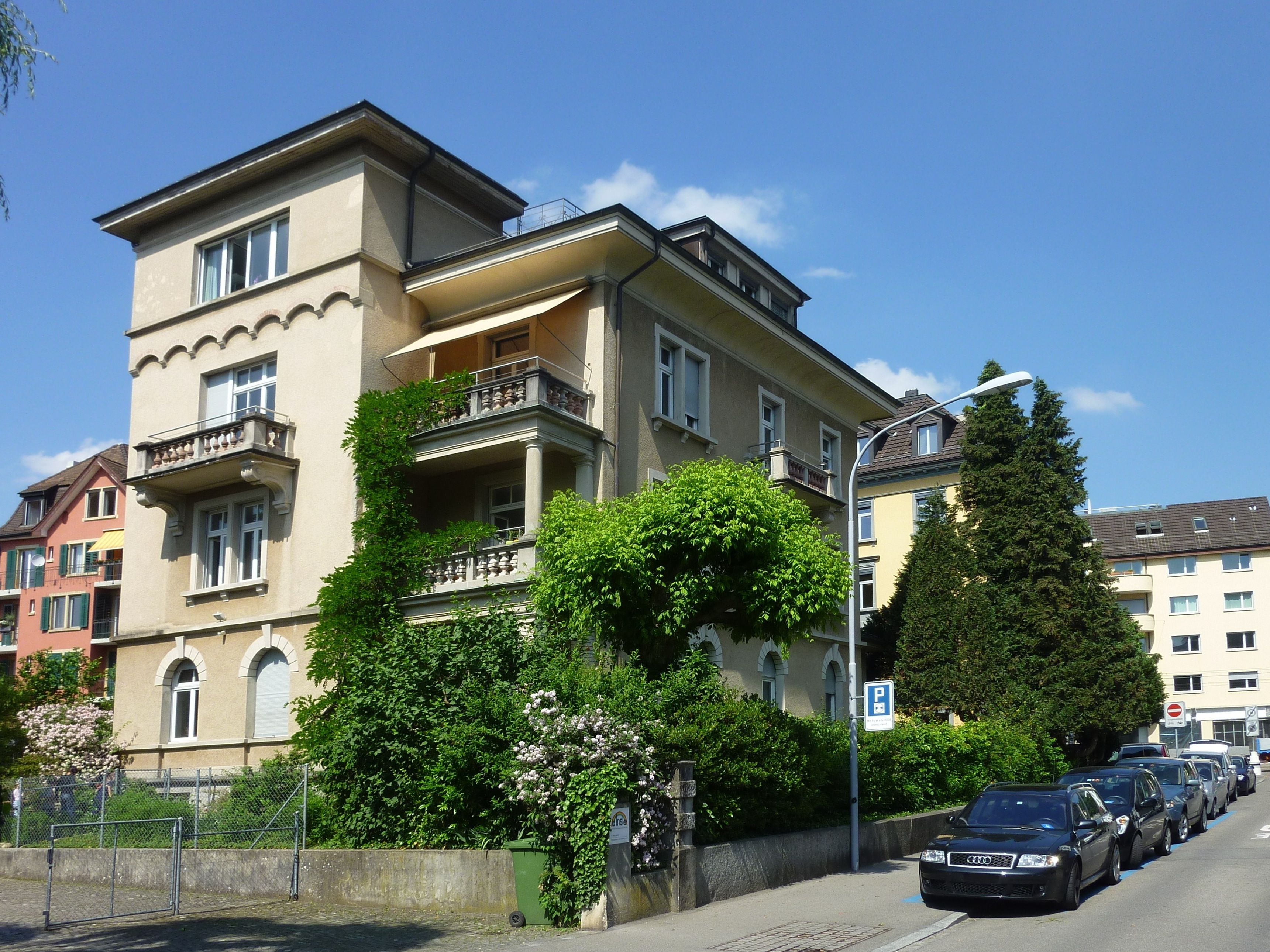 Marius Beul : Wohnhaus an der Signaustrasse 9 in Zürich am Zürichsee